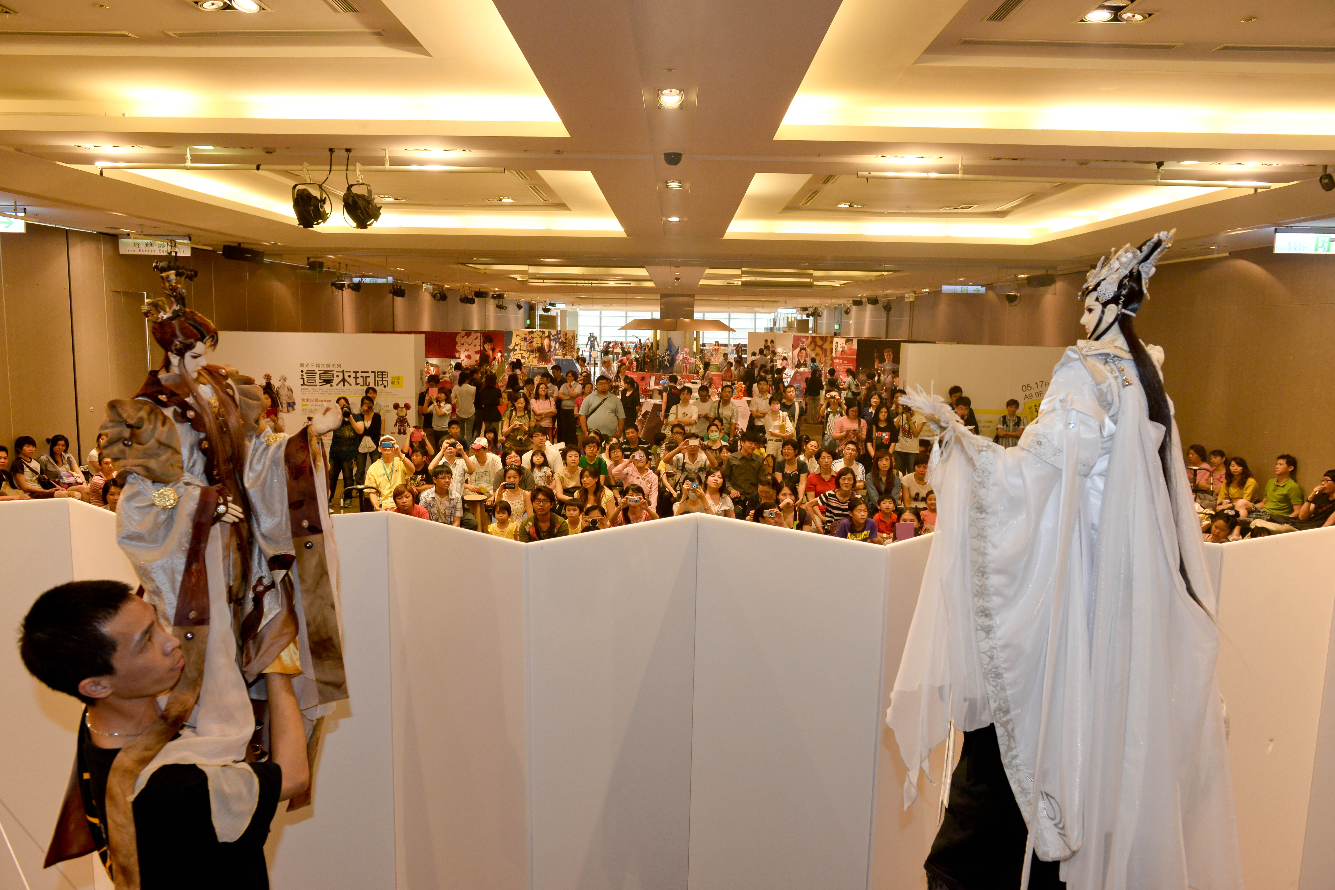 三昧堂2013年新光三越台北信義店粉絲會